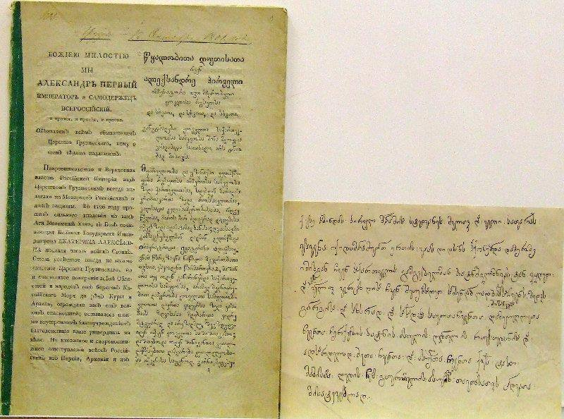 ალექსანდრე I-ის 1801 წლის 12 სექტემბრის მანიფესტი